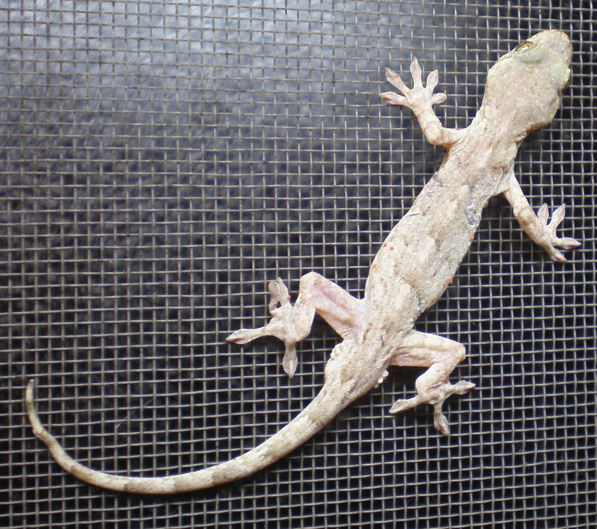 Nihon Yamori (Gekko japonicus)